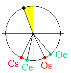 see name